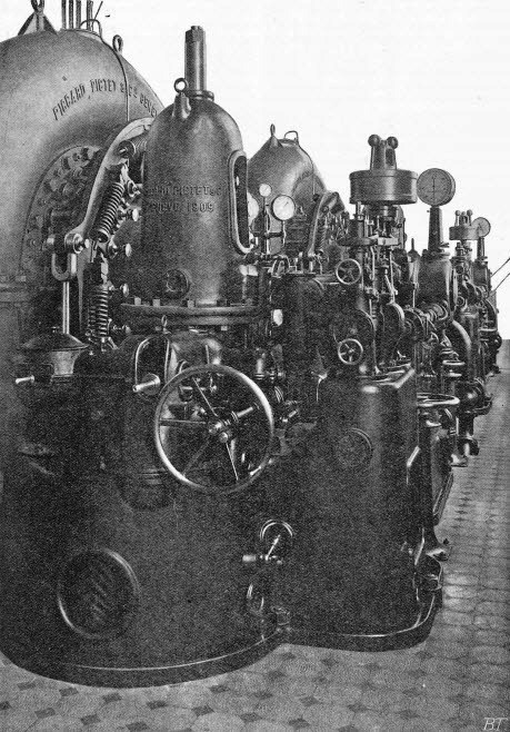 Turbine von Ateliers Piccard-Pictet & Cie. im BLS-Kraftwerk Spiez. Im Vordergrund der ölhydraulische Drehzahlregeler der liegenden Francis-Turbine. Die Maschine hat eine Leistung von 3200 PS und erzeugte Bahnstrom mit einer Frequenz von 16 2/3 Hz.